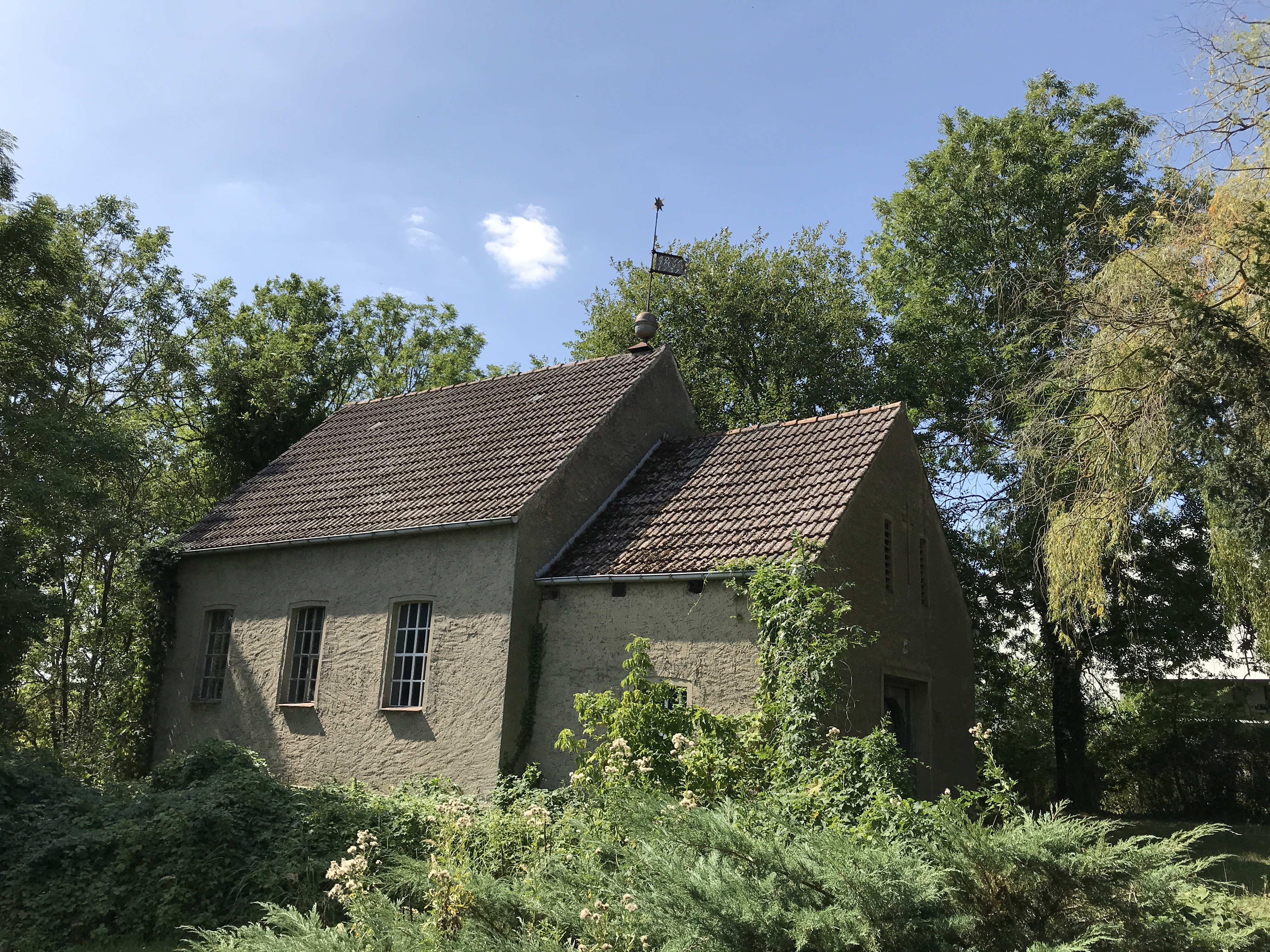 Die Dorfkirche Schwarzensee in Schwarzensee, einem Ortsteil der Stadt Strasburg (Uckermark) ist ein Sakralbau im Landkreis Vorpommern-Greifswald in Mecklenburg-Vorpommern. Im Turm hängt eine Glocke aus dem Jahr 1743.